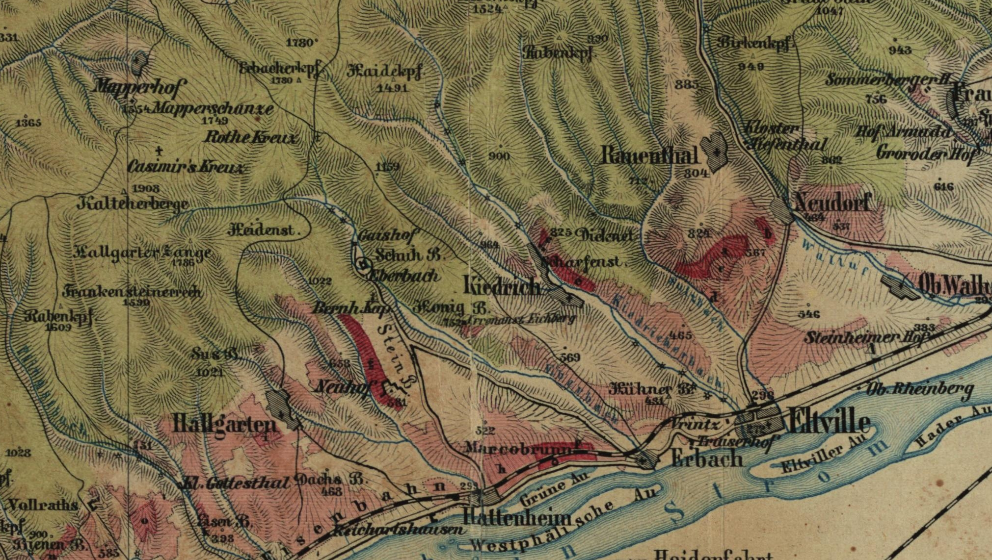 Ehemalige Rheingauer Klosterhöfe des Klosters Eberbach: Mapper Hof, Hof Gaisgarten (Gaishof), Neuhof, Reichartshausen, Draiser (Traiser) Hof, Steinheimer Hof. Karte von 1867.